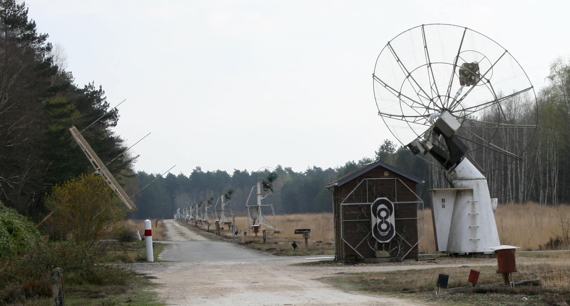 Ligne est du radiohéliographe de Nançay (France)